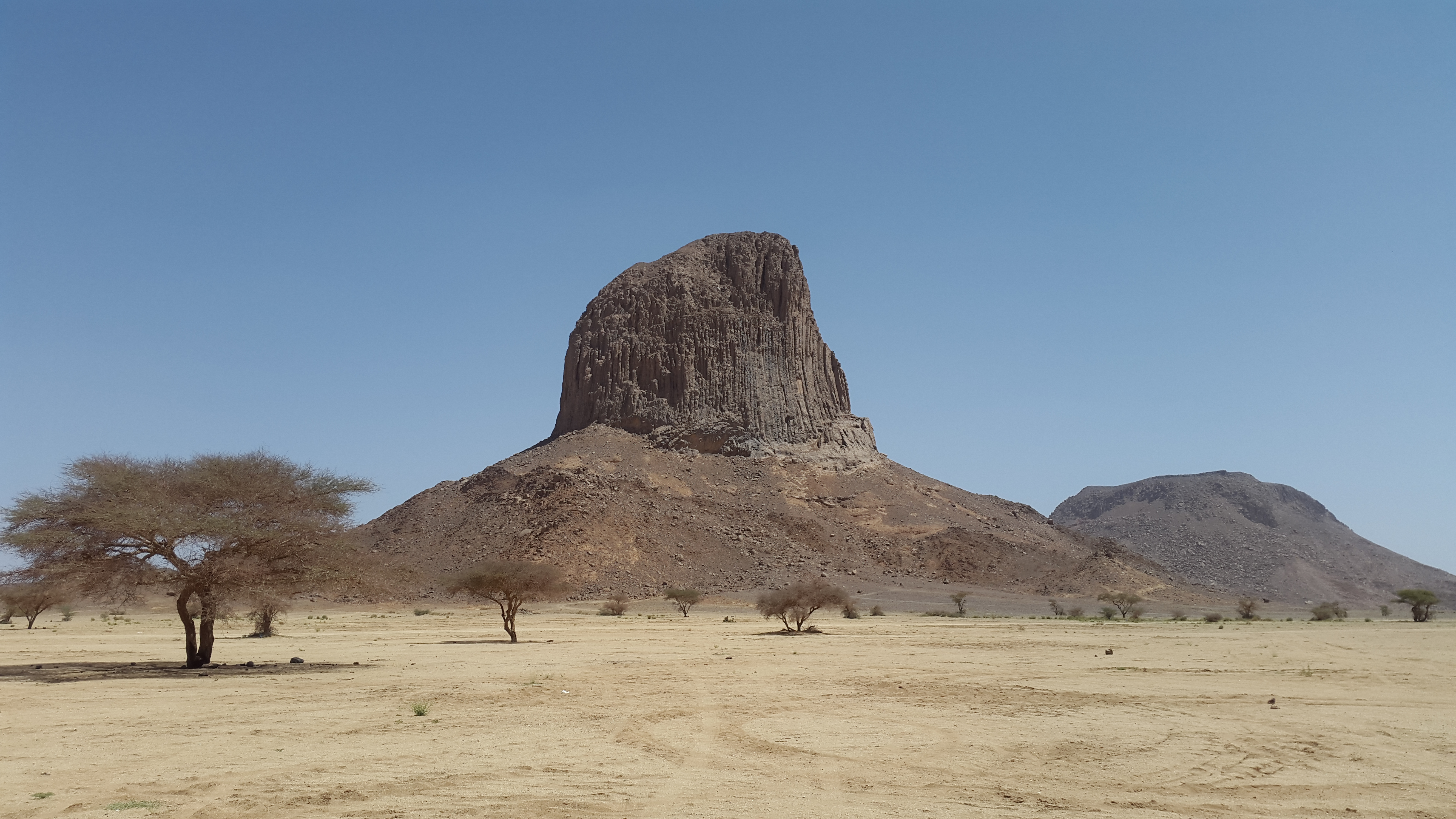 Paysage Saharien Algerien sur la route de l'Assekrem